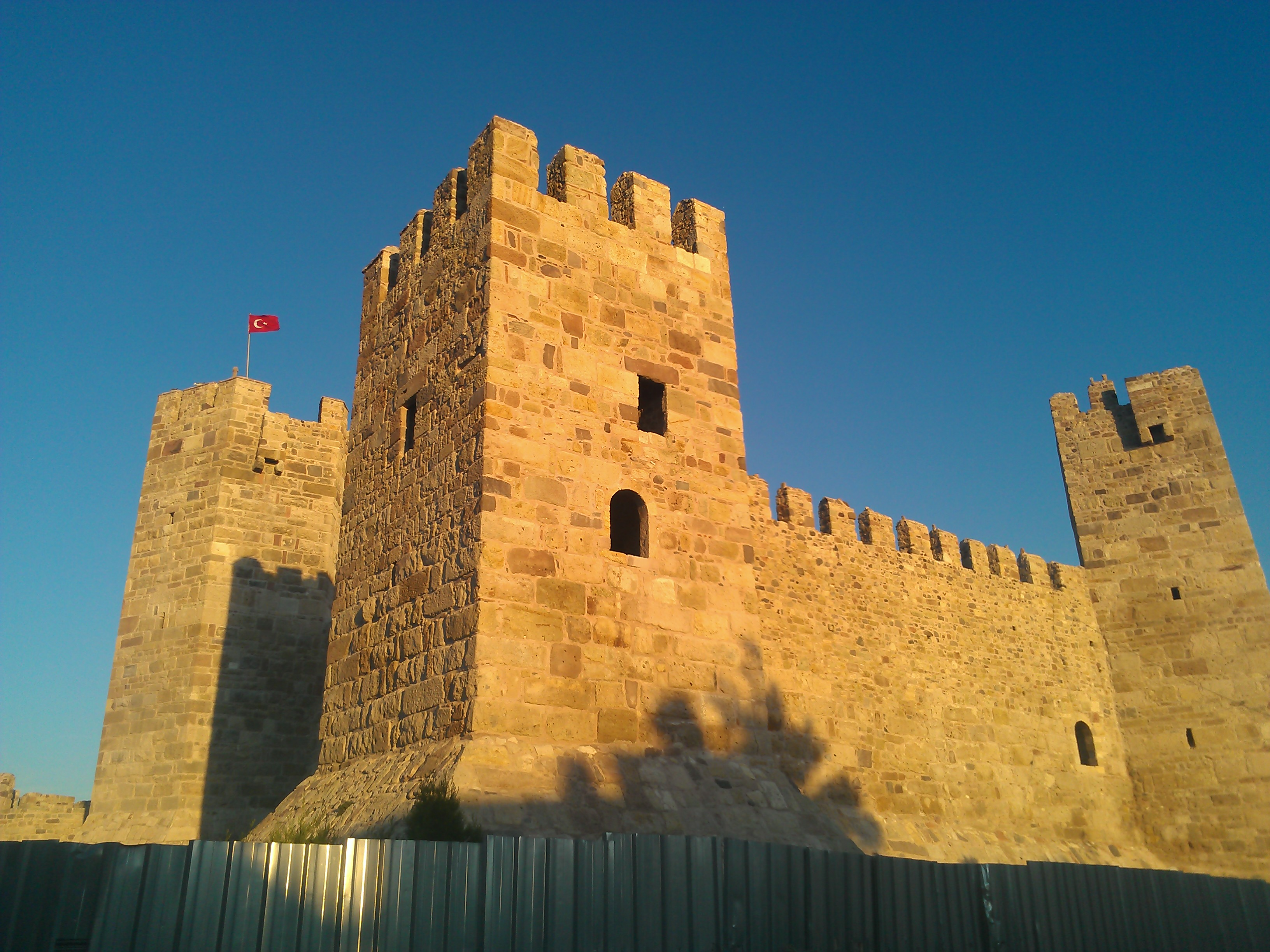 Genuees kasteel in Candarli, Turkije.